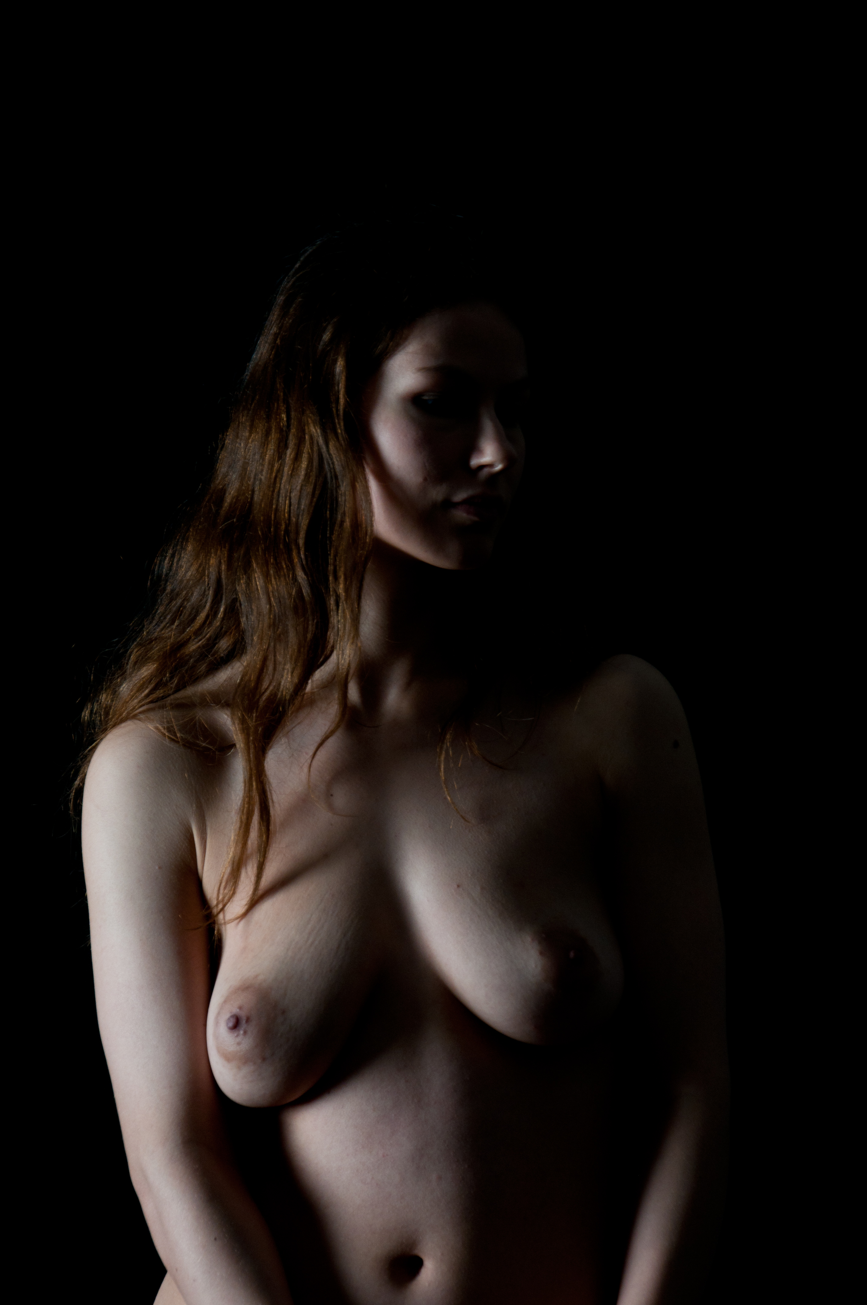 Aktstudie Lowkey Personality rights warningAlthough this work is freely licensed or in the public domain, the person(s) shown may have rights that legally restrict certain re-uses unless those depicted consent to such uses. In these cases, a model release or other evidence of consent could protect you from infringement claims.